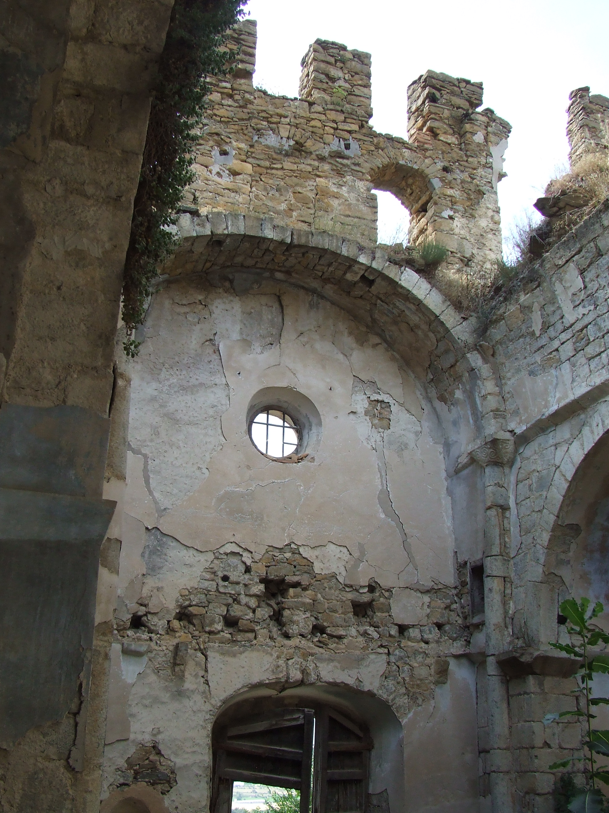 Peus de la nau de Sant Fruitós d'Aramunt (Conca de Dalt, Pallars Jussà)